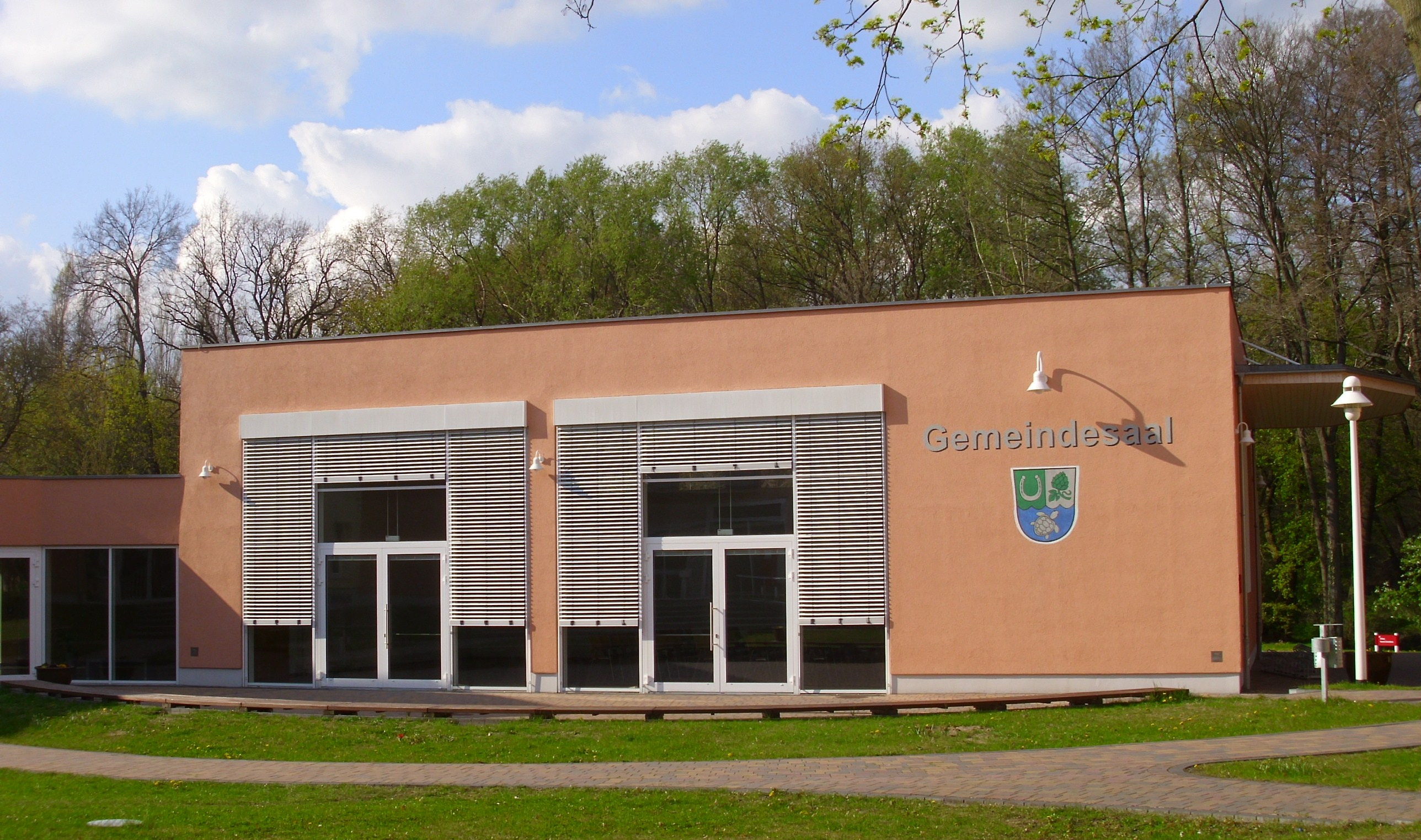 Gemeindesaal in Lindenallee Hoppegarten